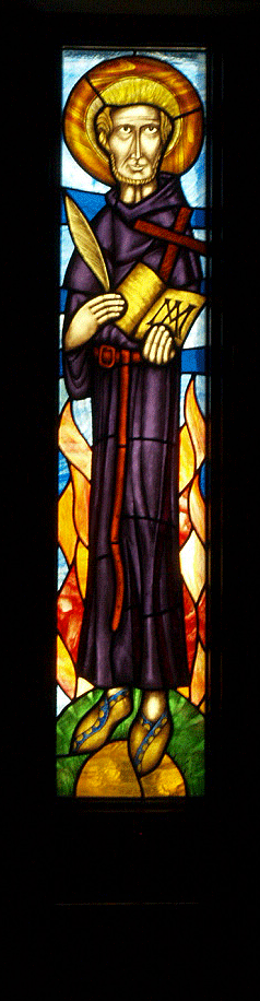 De origen noble, estudió en Talavera de la Reina y en la Universidad de Salamanca. En 1520 Santo Tomás de Villanueva le incitó a ingresar en la Orden de San Agustín, y allí profesó en 1523. Se ordenó sacerdote en 1527. De niño, sirvió como seise en la Catedral de Toledo. Allí estudió el arte de la música, que después amó con pasión. Entre 1530 y 1537 fue conventual en Medina del Campo. En 1538, prior de Soria y en 1540 de Medina. Al año siguiente, 1541, le nombraron definidor de la provincia de España. Entre 1542 y 1544 fue prior de Sevilla y entre 1544 y 1548, de Granada, y desde 1545, visitador de Andalucía. En 1542 contó que tuvo un sueño en Sevilla en el cual la Virgen le ordenó que escribiera; ese fue el origen de su obra literaria. En 1549 se embarcó como misionero hacia México, pero enfermó y tuvo que volver. En 1554, siendo prior del convento de Valladolid, Carlos V le nombró predicador real y pasó a Madrid cuando se trasladó allí la Corte en 1561, al convento de San Felipe el Real. Fundó numerosos conventos. Al morir en 1591 gozaba de fama de gran santidad, y testificaron en su proceso de beatificación Lope de Vega y Francisco de Quevedo, así como importantes nobles. Fue nombrado beato por el papa León XIII el 15 de enero de 1882 y canonizado por Juan Pablo II el 19 de mayo de 2002.